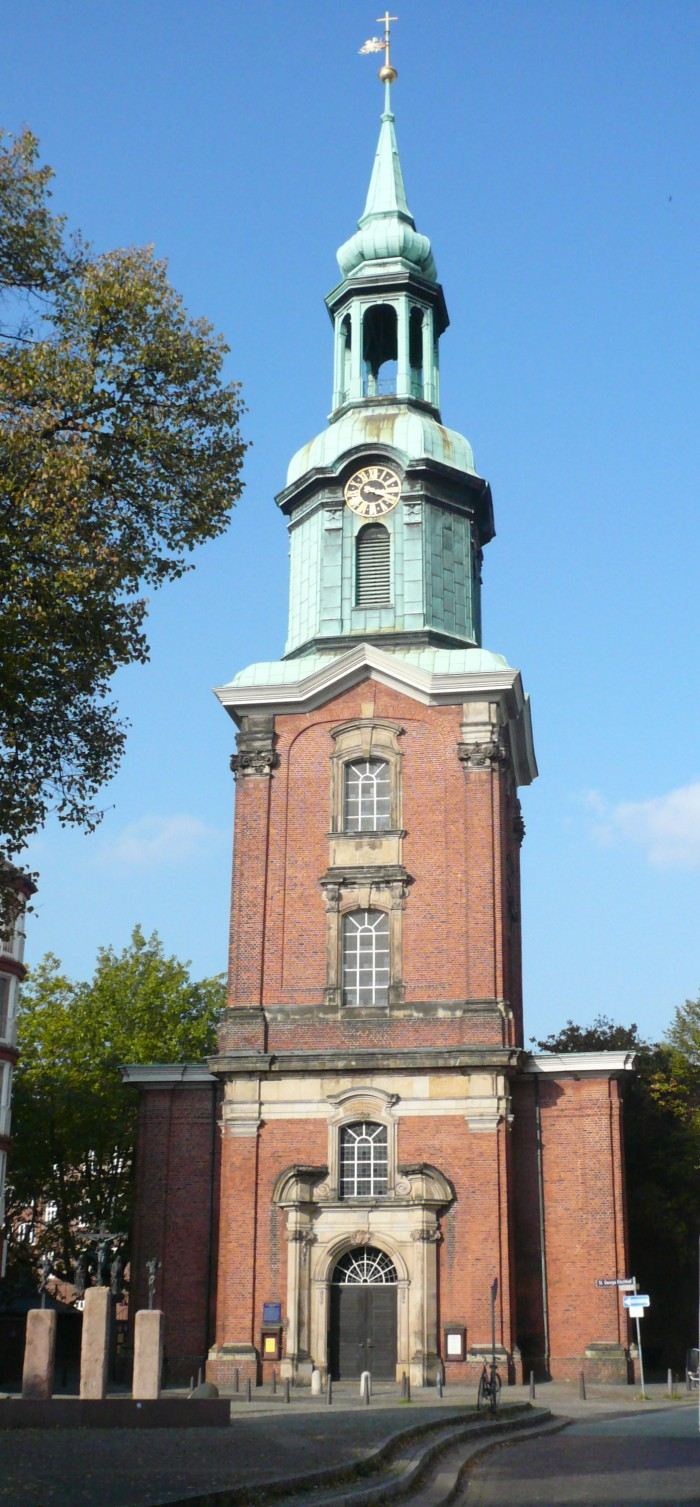 Dreinigkeitskirche im Stadtteil Hamburg-Sankt Georg